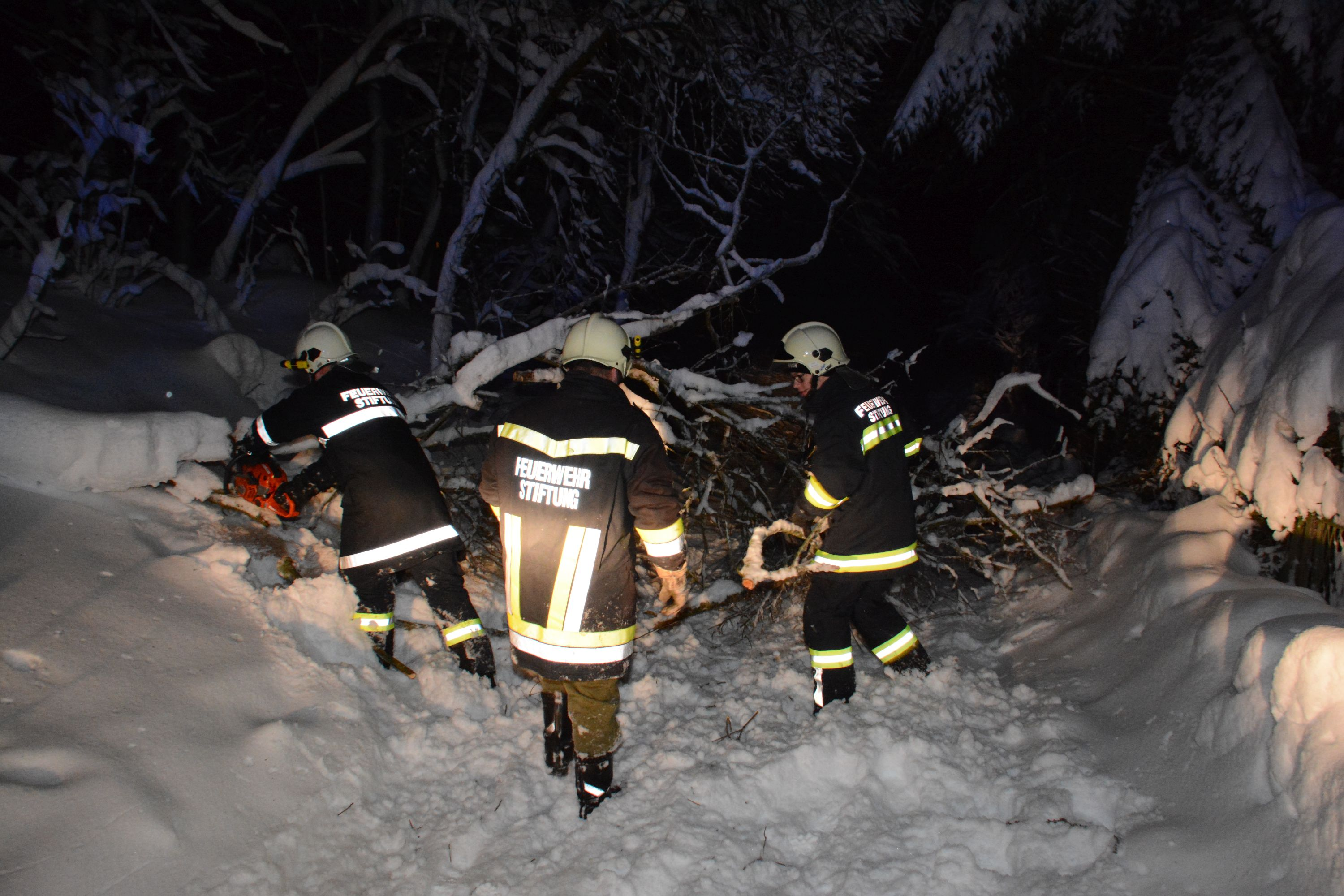 Baumbruch durch Schneelast in Stiftung